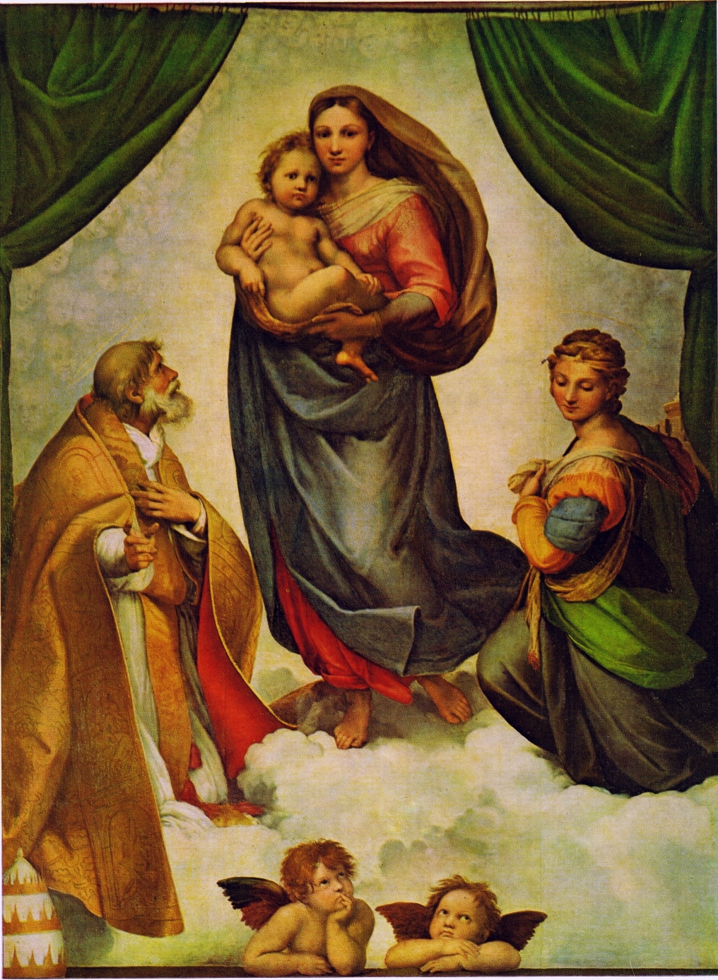 Maria mit Christuskind, Hl. Papst Sixtus II. und Hl. Barbara